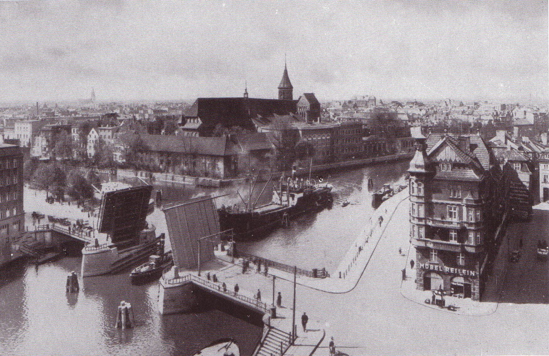 Fotografie der Dominsel mit dem Albertinum in Königsberg, Blickrichtung WSW. Vorn die geöffnete Holzbrücke zum neuen Pregel.